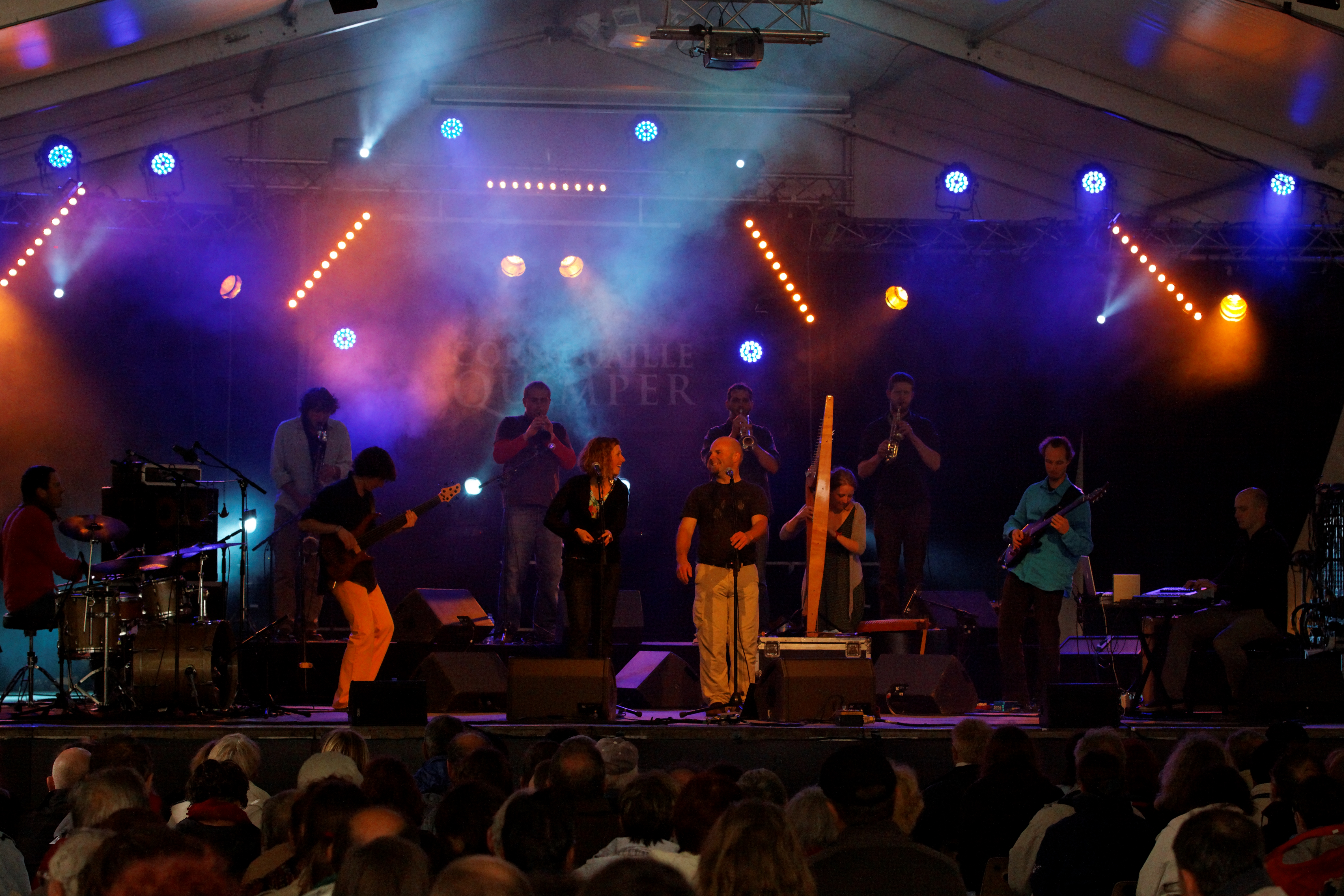 Kreiz Breizh AKademi 3 en concert le 19 juillet lors du festival de Cornouaille 2011.